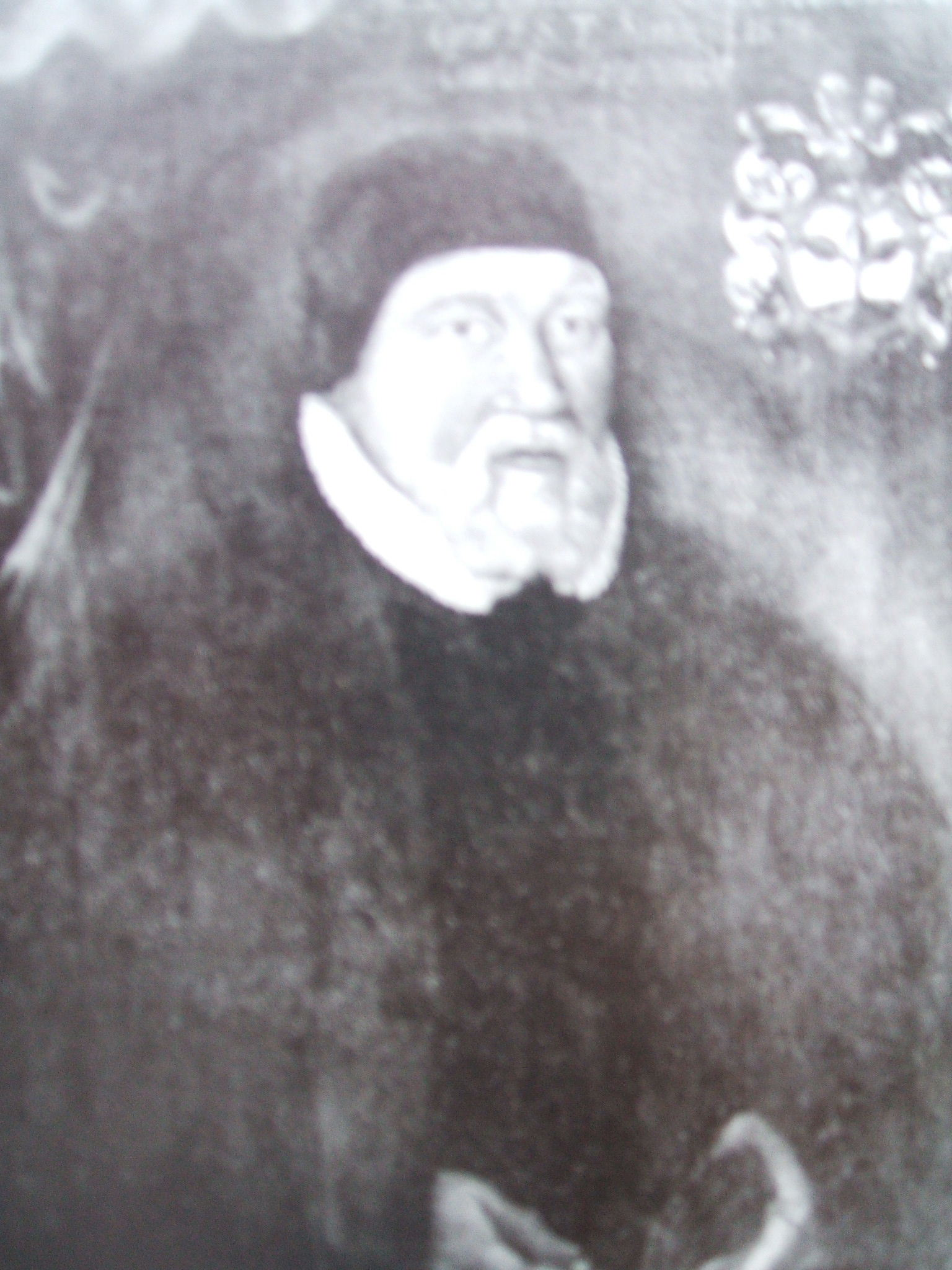 Das Foto zeigt Nikolaus Gentzkow. Es handelt sich hier um ein Ölgemälde auf Holz, dieses hängt im Stralsunder Rathaus.